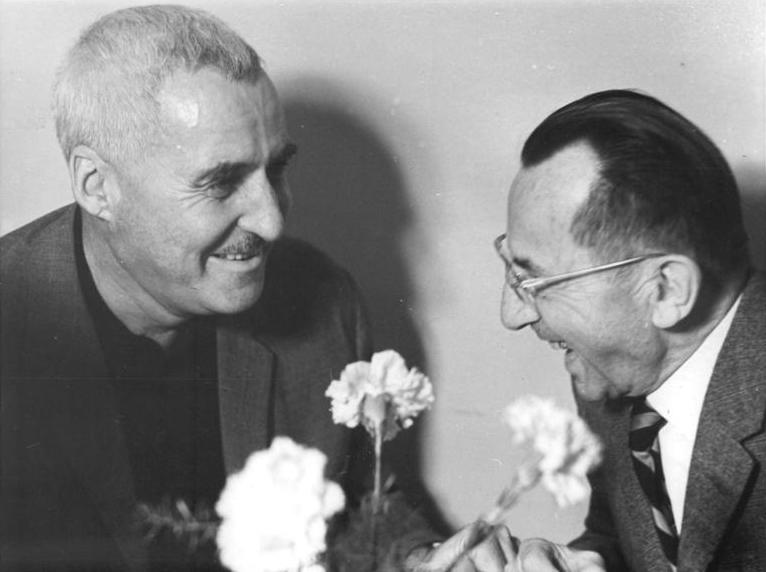 Zentralbild Link 19.10.67 Eine herzliche Begegnung gab es am 19.10.67 im Berliner Club der Kulturschaffenden "Johannes R. Becher" als sich der große sowjetischen Schriftsteller Konstantin Simonow (links) mit dem namhafen Schriftsteller Bruno Apitz, Vorstandsmitglied im Deutschen Schriftstellerverband, traf.